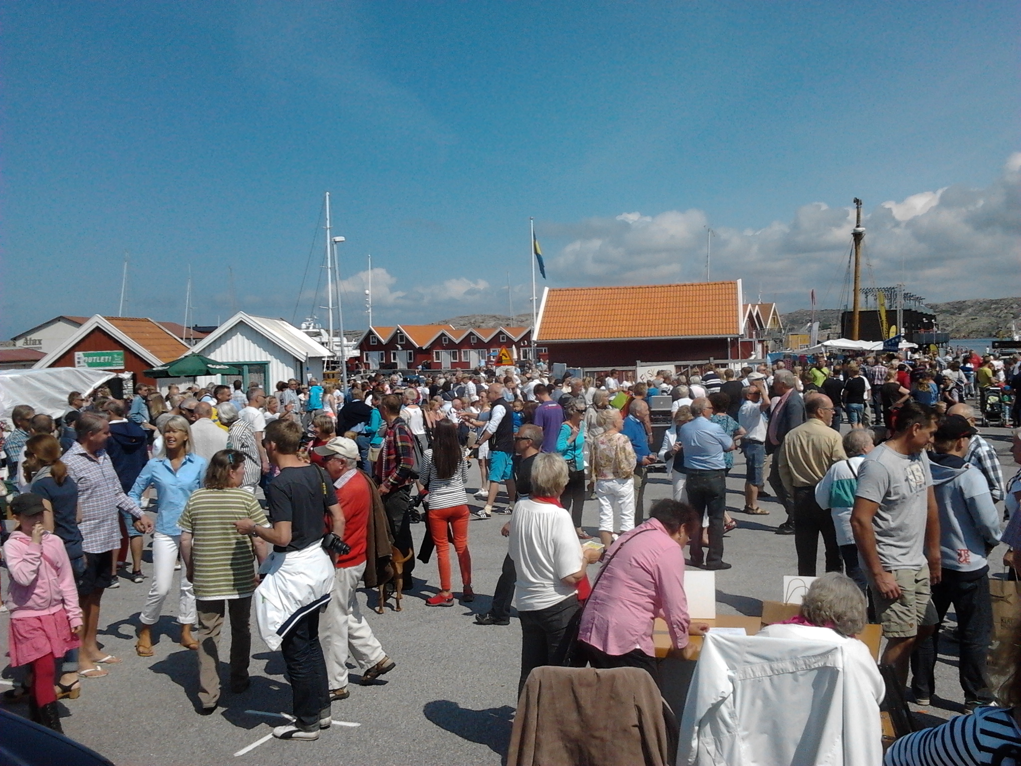 Folkmyller under Sillens Dag 2013 på Klädesholmen.